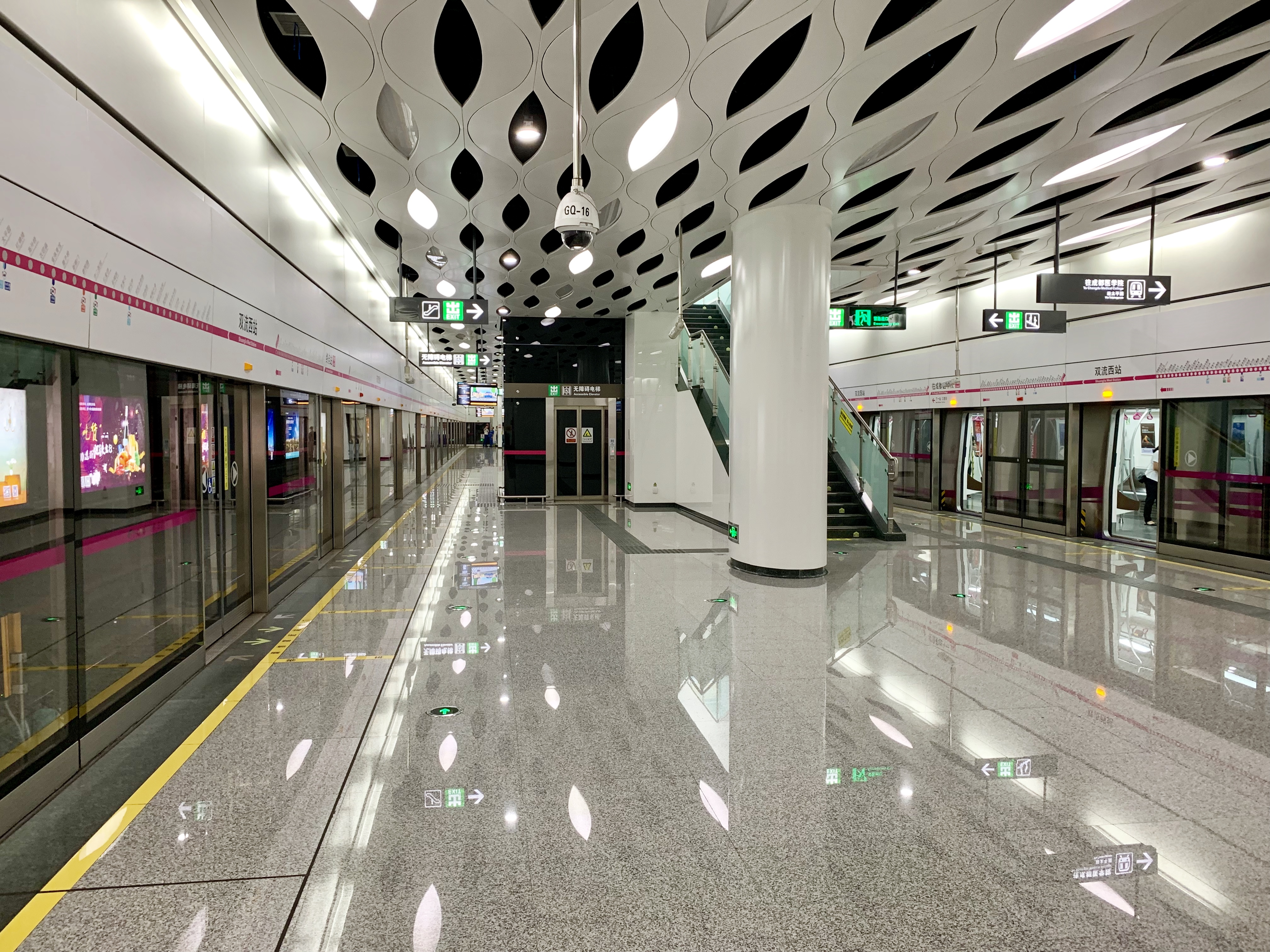 成都地铁双流西站站